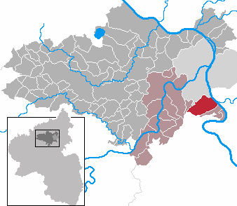 Rhens in Rhineland-Palatinate - district Mayen-Koblenz